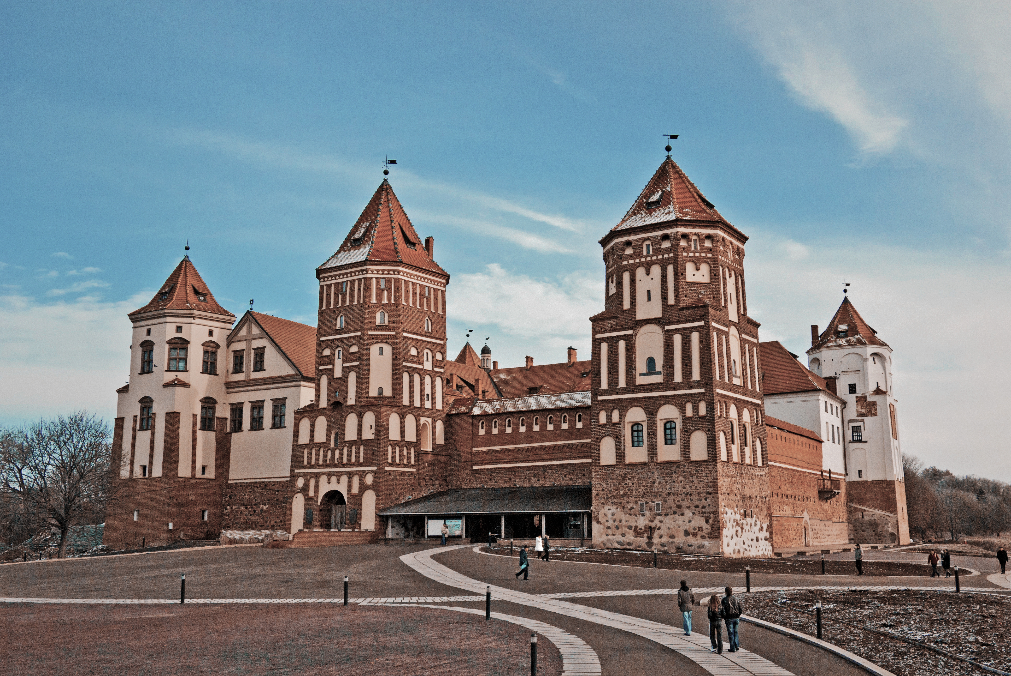 Беларуская (тарашкевіца): Замкавы комплекс «Мір». Будынкі, збудаваньні, пляніровачная структура, ляндшафтныя кампазыцыі, рэшткі земляных абарончых збудаваньняў, элемэнты абвадненьня. г.п. Мір